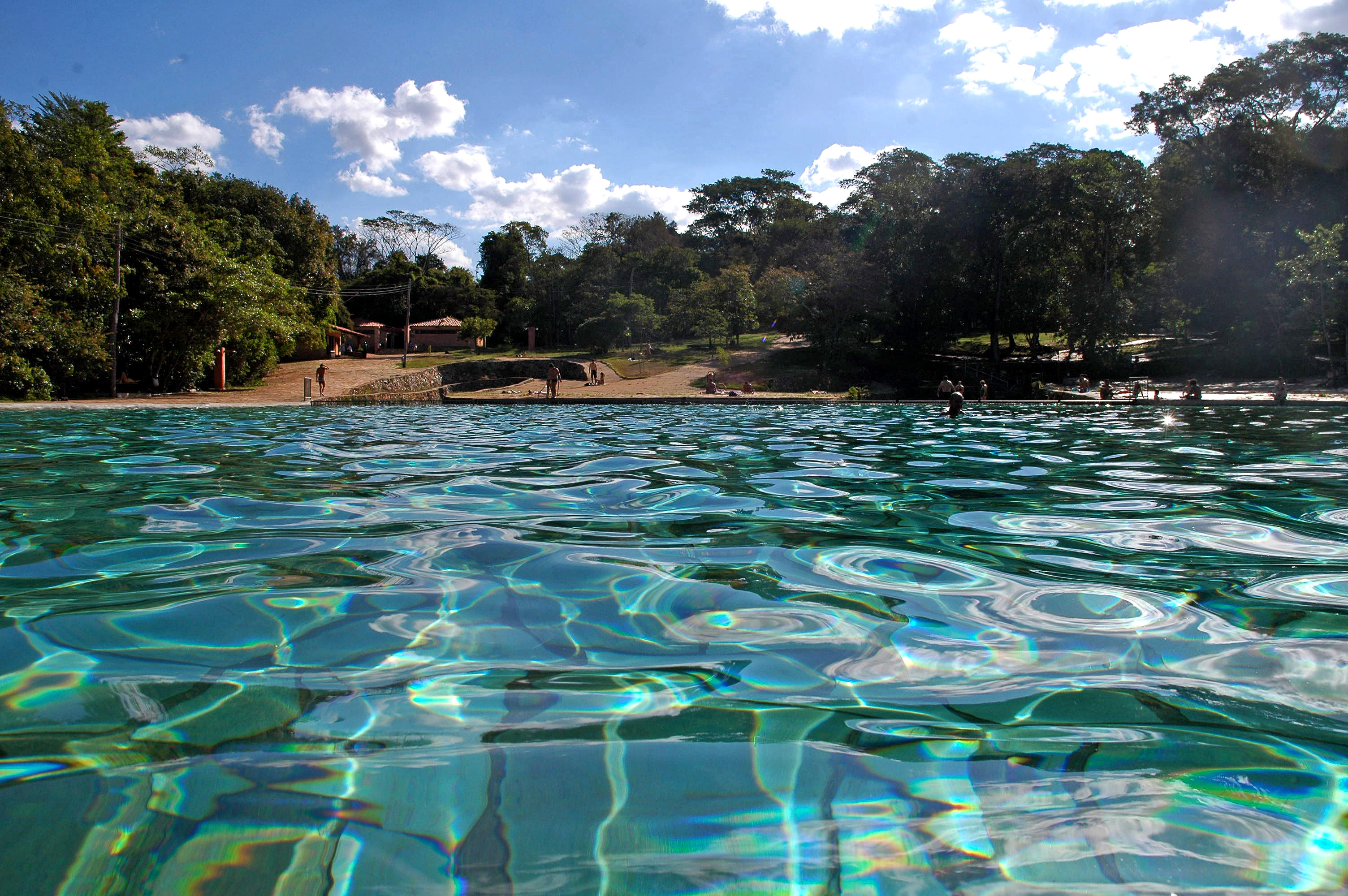 Parque "Agua Mineral" em Brasília, DF Foto: Equipe